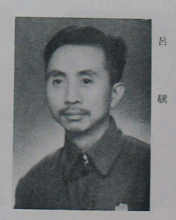 中文（台灣）: 中國人民政治協商會議第一屆全體會議代表